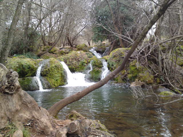 Cascadas en el Río Rivera del Huéznar, cerca de San Nicolás del Puerto (Sevilla) España